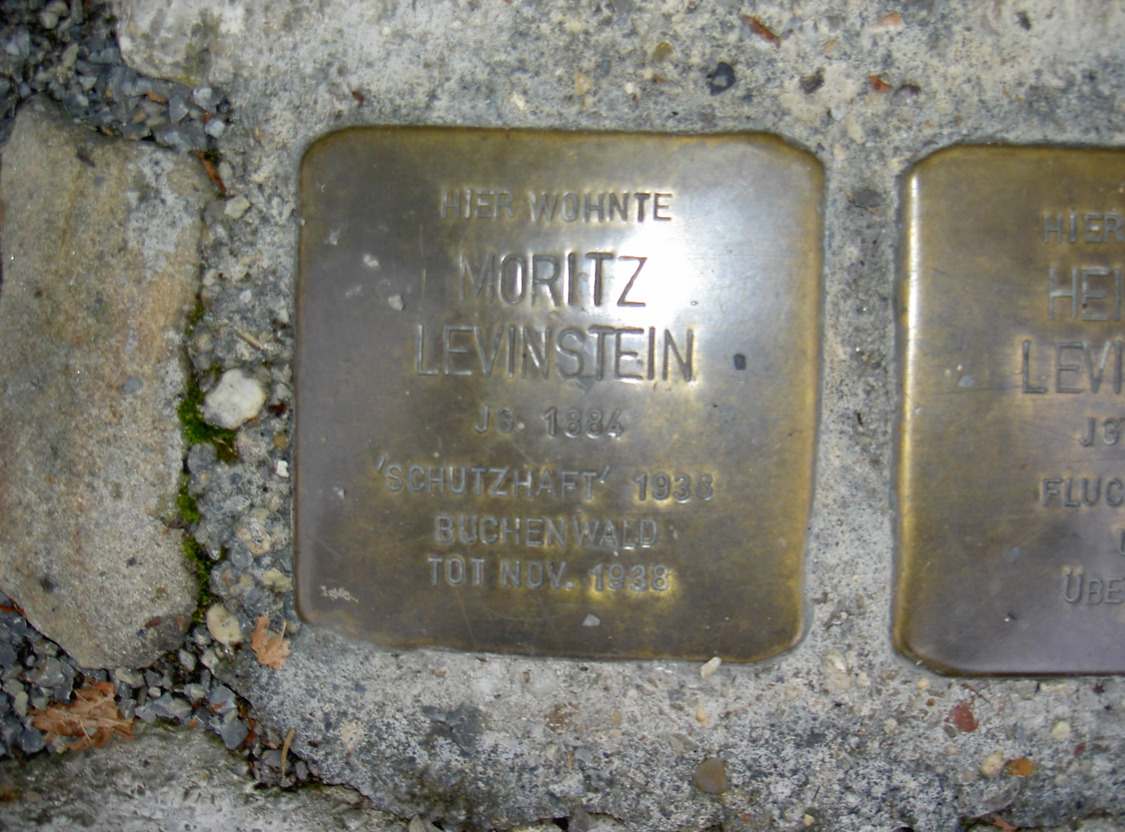 Stolperstein in Themar Levinstein Moritz